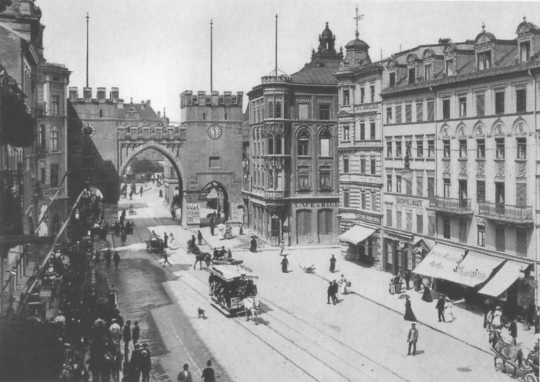 Neuhauser Straße mit dem Karlstor